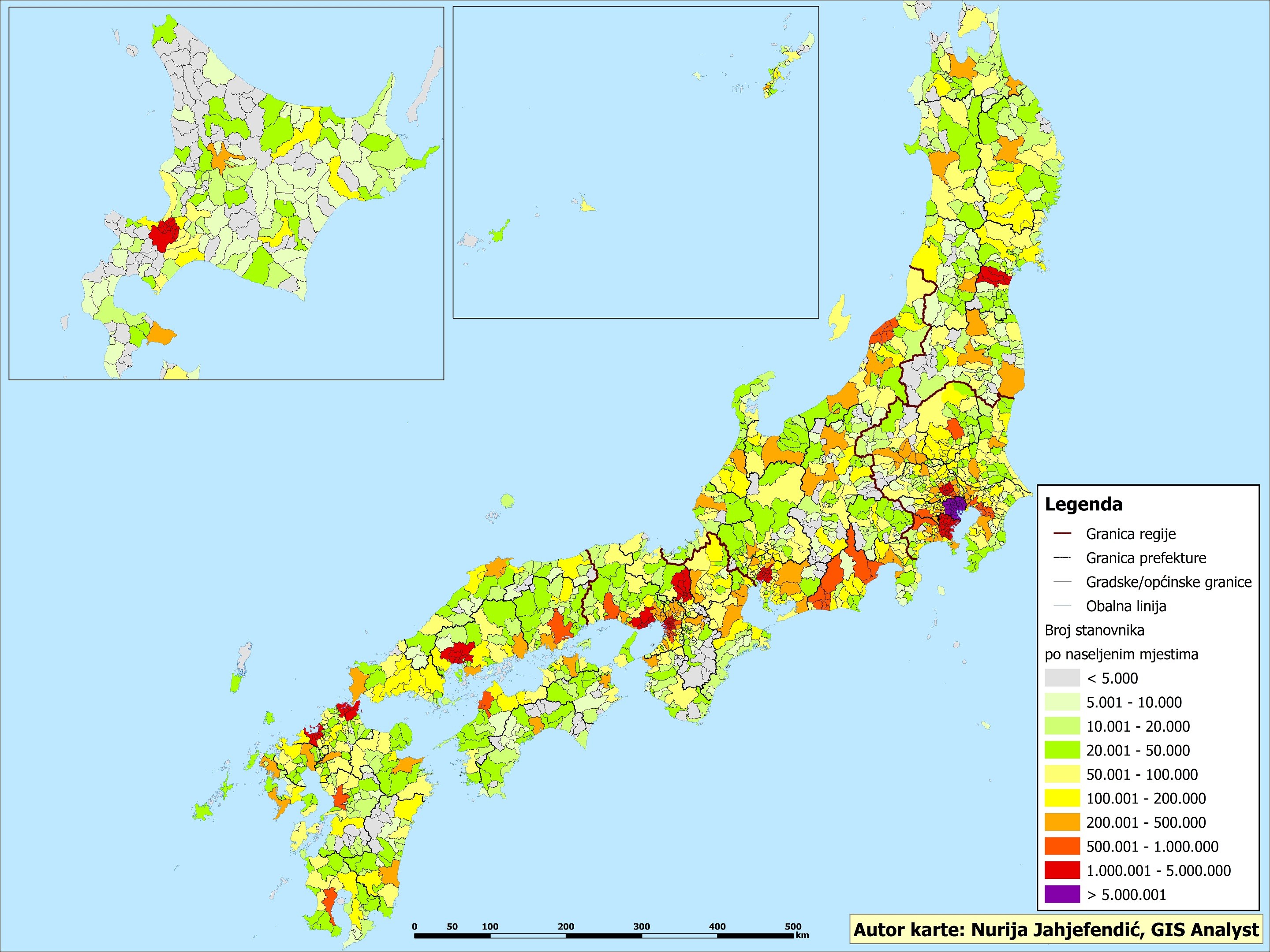 Broj stanovnika po naseljenim mjestima u Japanu 2015.